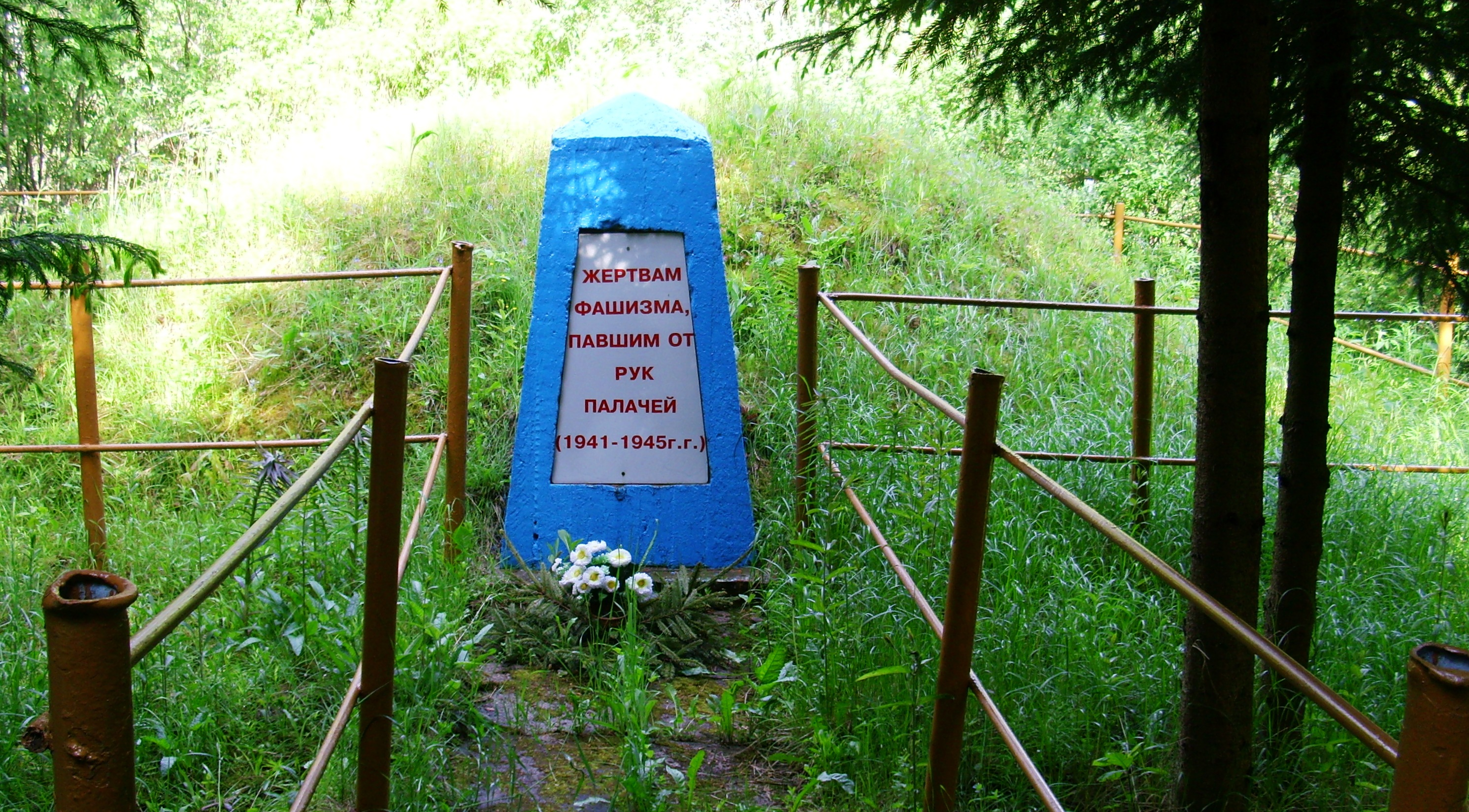 Памятник 353 убитым во время Холокоста евреям в урочище Ройста Ошмянского района.